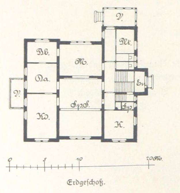 Villa Dr. Julius Gensel in der Hillerstraße 3 im Leipziger Bachviertel Julius Gensel wirkte nicht nur als Notar und Rechtsanwalt, sondern war zugleich auch Sekretär der (Industrie- und) Handelskammer Leipzig 1883 ließ er sich von dem Berliner Architekten Heinrich Stöckardt seine repräsentative Villa in der Leipziger Hillerstraße 3 errichten.